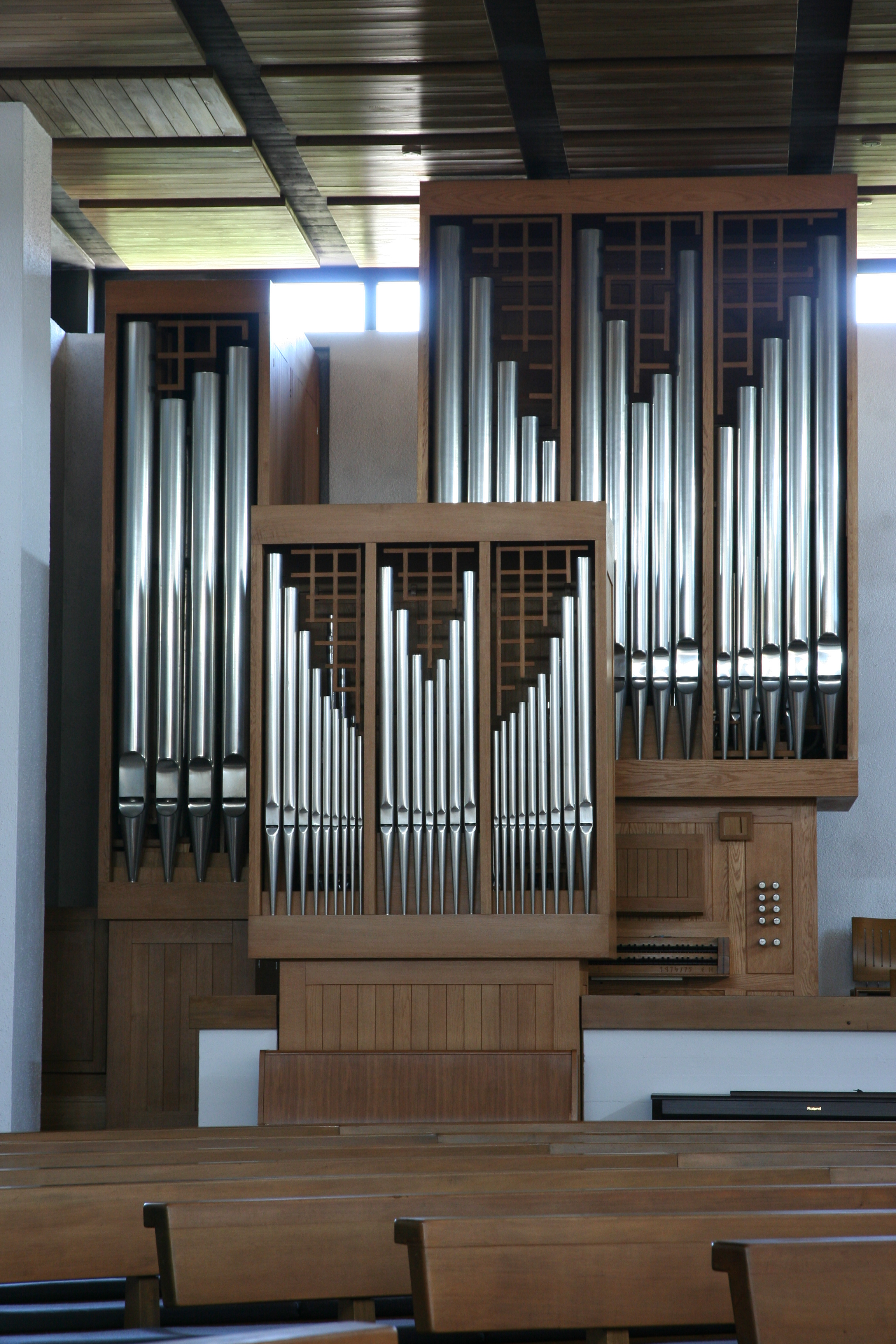 röm.-kath. Pfarrkirche Eschlikon TG